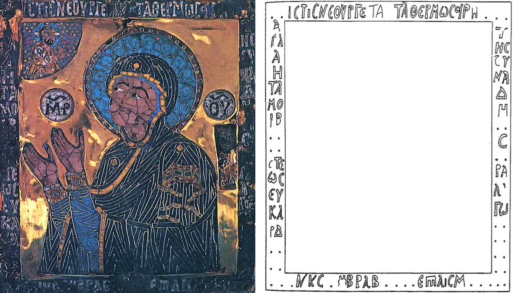 Montage van twee afbeeldingen van de voorzijde van een Byzantijns enkolpion (reliekhangertje) in de Schatkamer van de Onze-Lieve-Vrouwebasiliek in Maastricht. Links: Maria-afbeelding in emaille cloisonné. De afbeelding van Maria die haar handen opheft naar een zegenende Christus, die veel kleiner is afgebeeld, is een zogenaamde Blacherniotissa, een kopie van een verloren gegaan icoon in de Blachernenkerk in Constantinopel (Istanboel). Rechts: het Griekse randschrift, schematisch weergegeven.